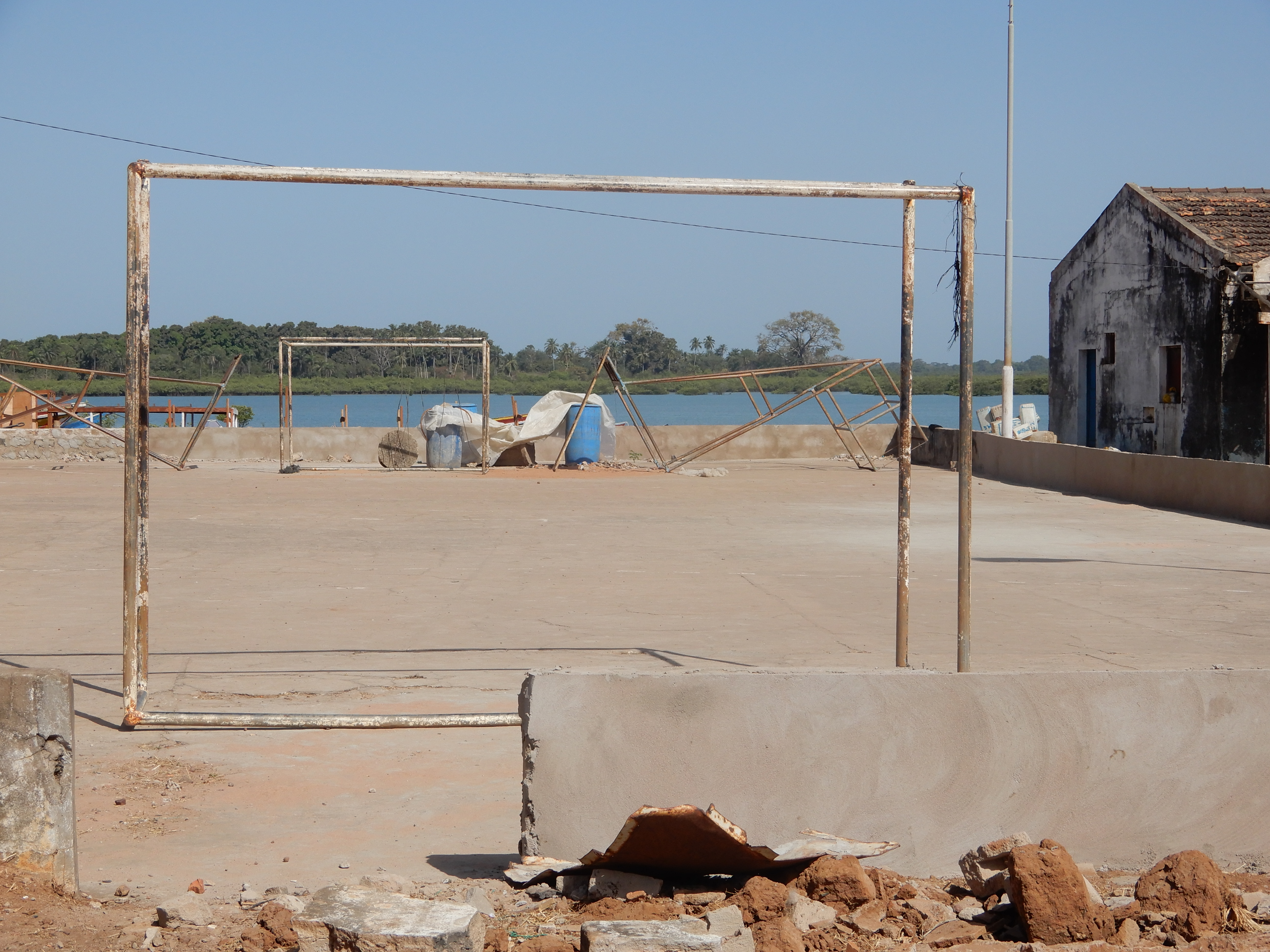 Campo de jogos, Bolama, Guiné-Bissau